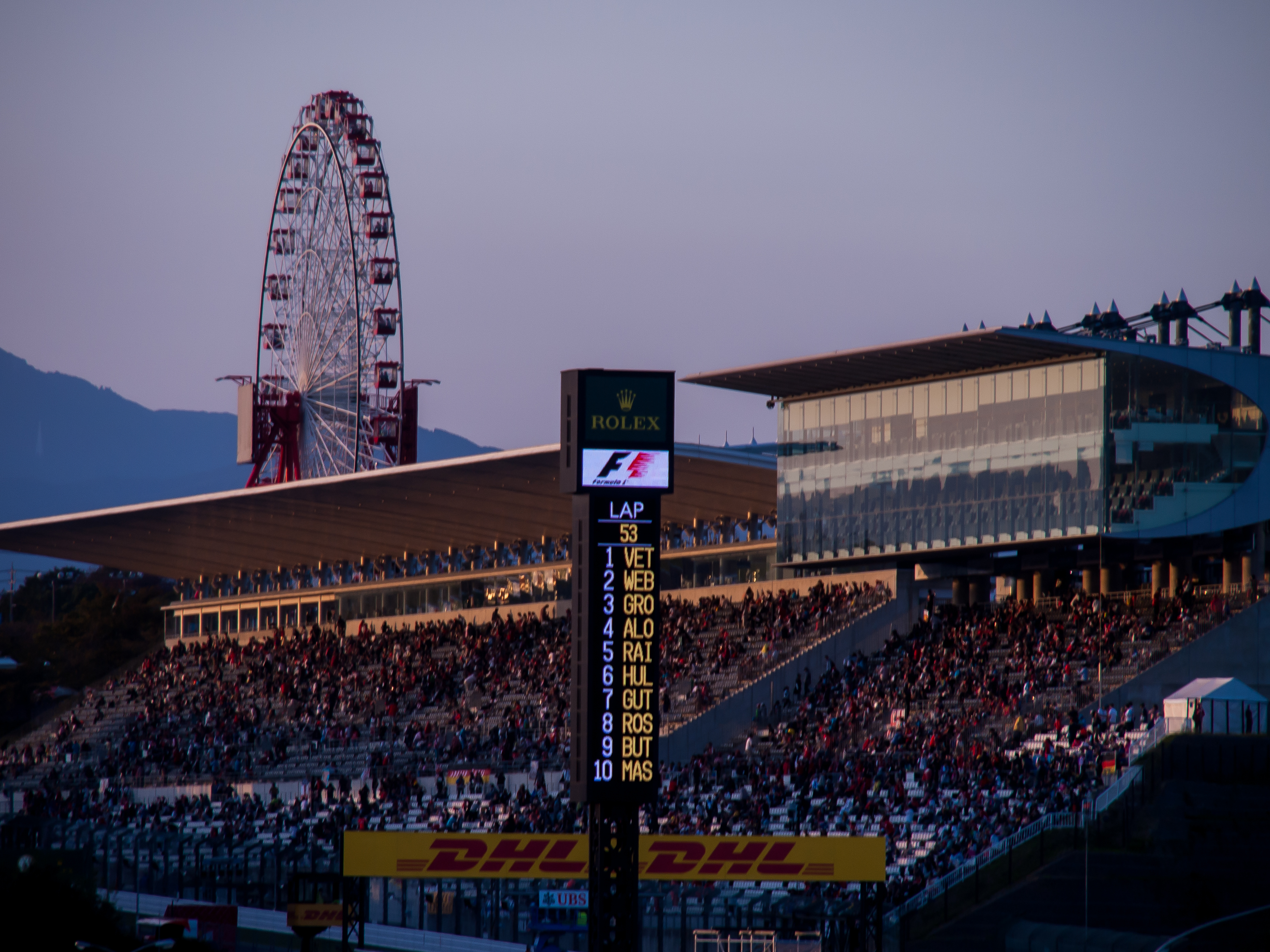 Classement du Grand Prix du Japon 2013